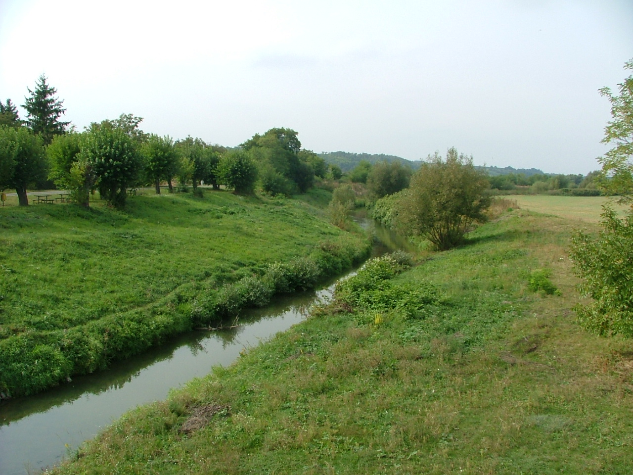 A Répce folyó Répcevisnél.jpg